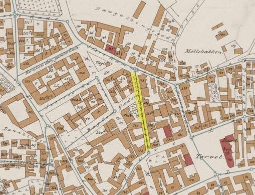 Lille Kammegate (Kammegaten) merket gul på et kart over Tønsberg fra 1895. Fra original.